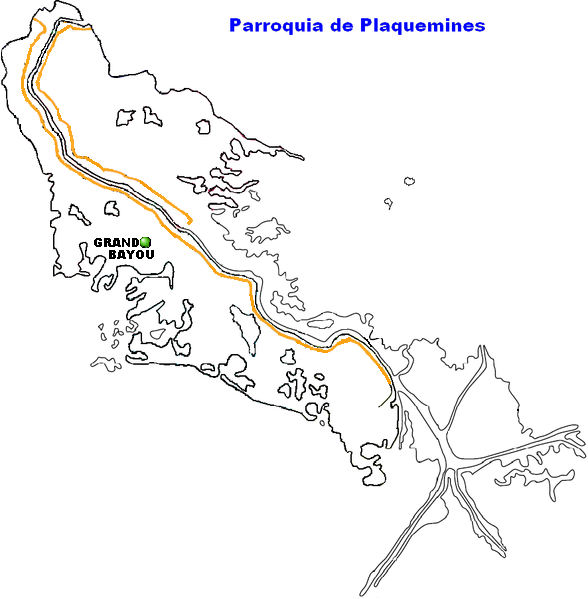 Grand Bayou, Louisiana